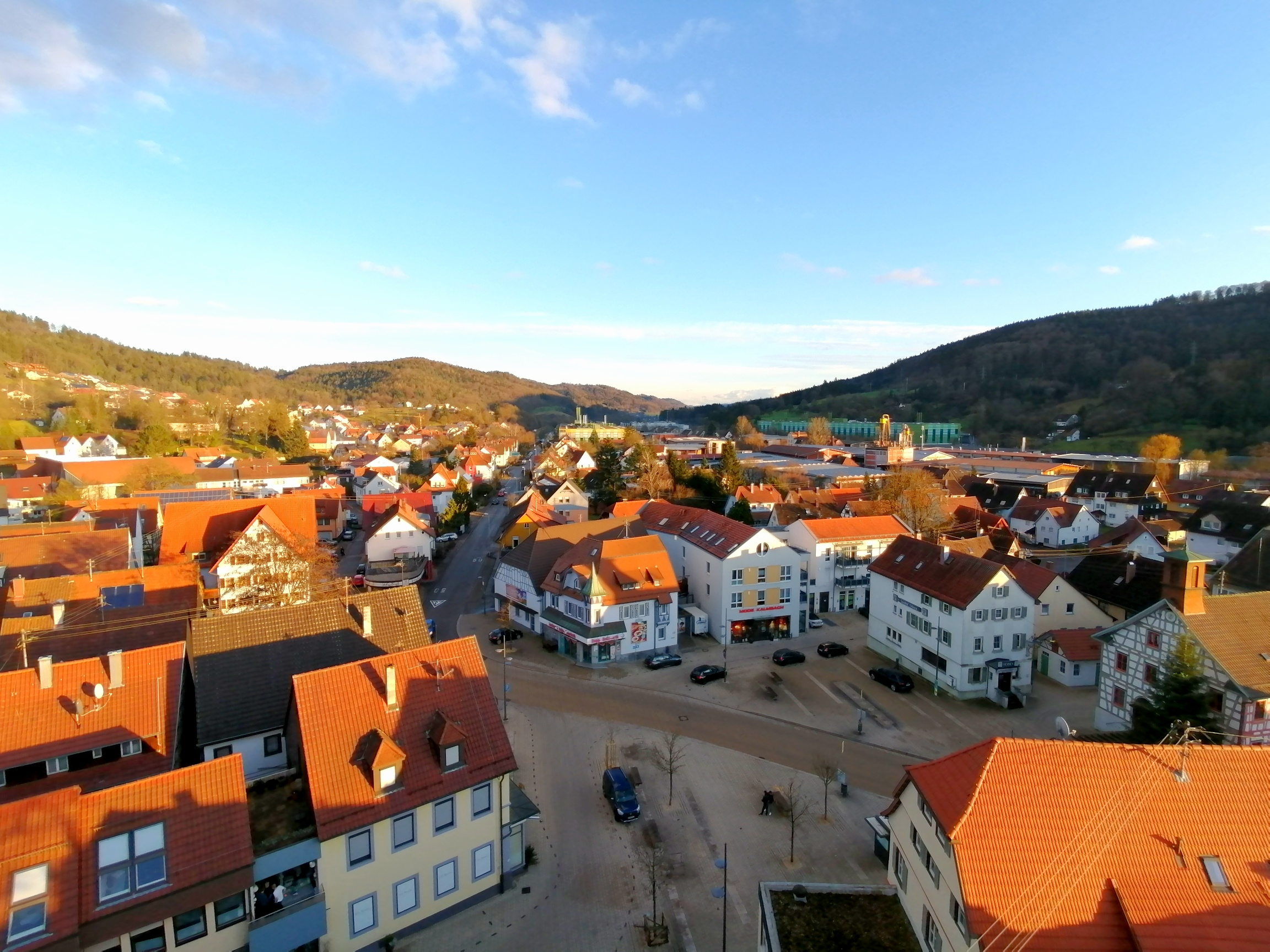 Blick vom Turm der Ulrichskirche auf den Marktplatz und ostwärts in die Murrhardter Straße in Sulzbach an der Murr.